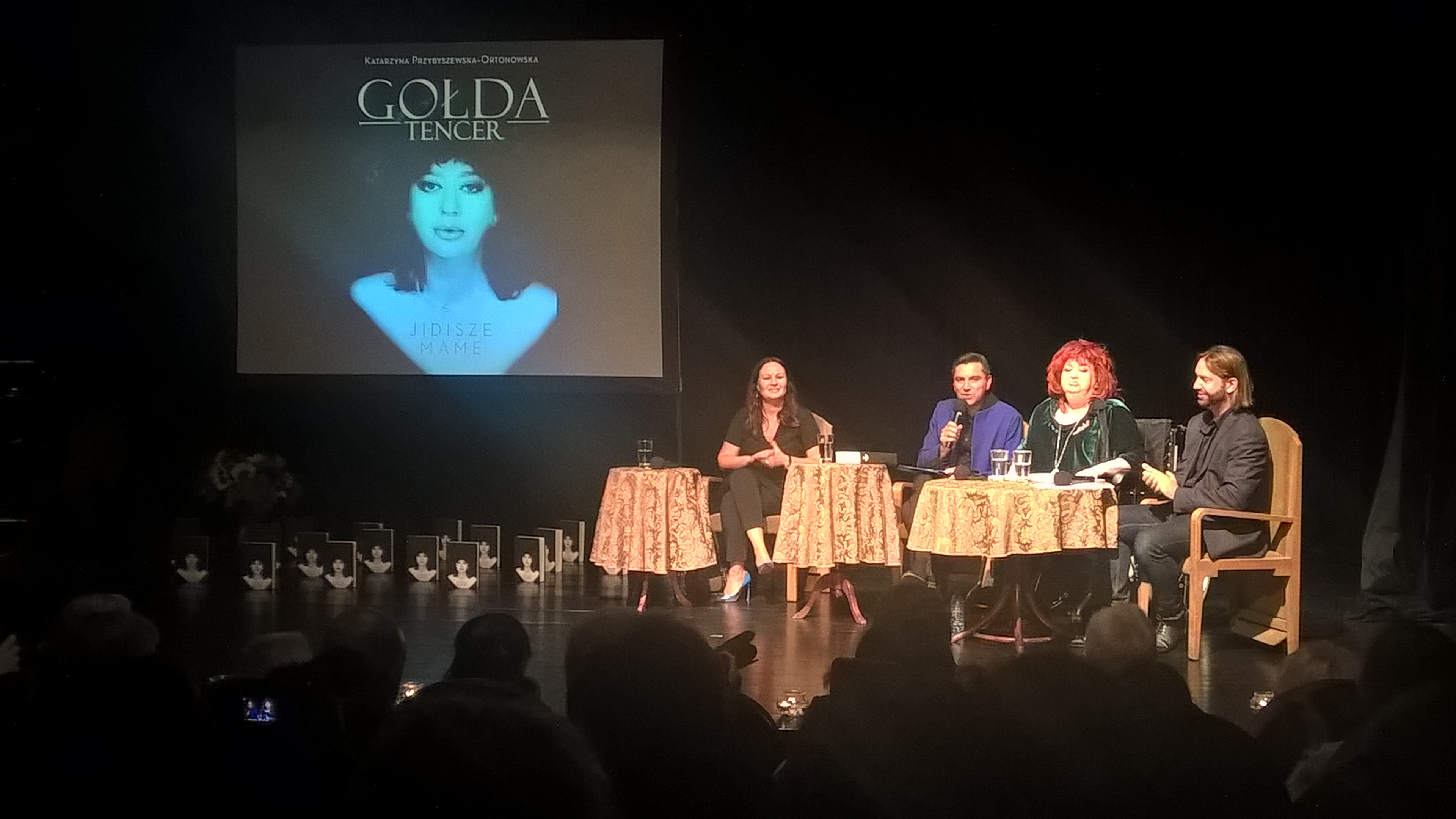 Présentation du livre sur Golda Tencer, le 1er septembre 2019, de gauche à droite, l'auteure Katarzyna Przybyszewska-Ortonowska, Remigiusz Grzela, Gołda Tencer, Dawid Tencer au théâtre Kwadrat